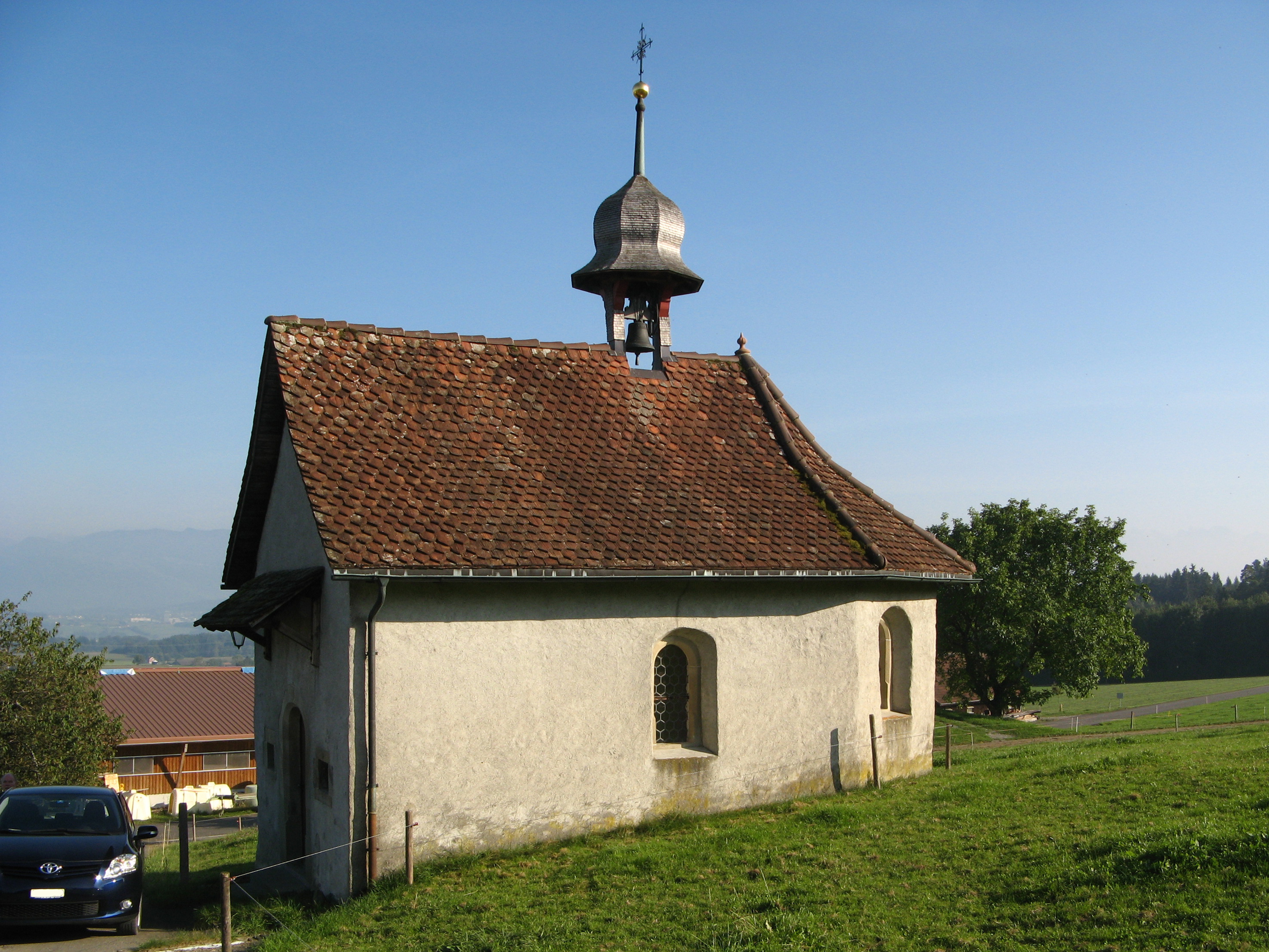 Kapelle St. Andreas in Holderstock bei Sins, Aussenansicht